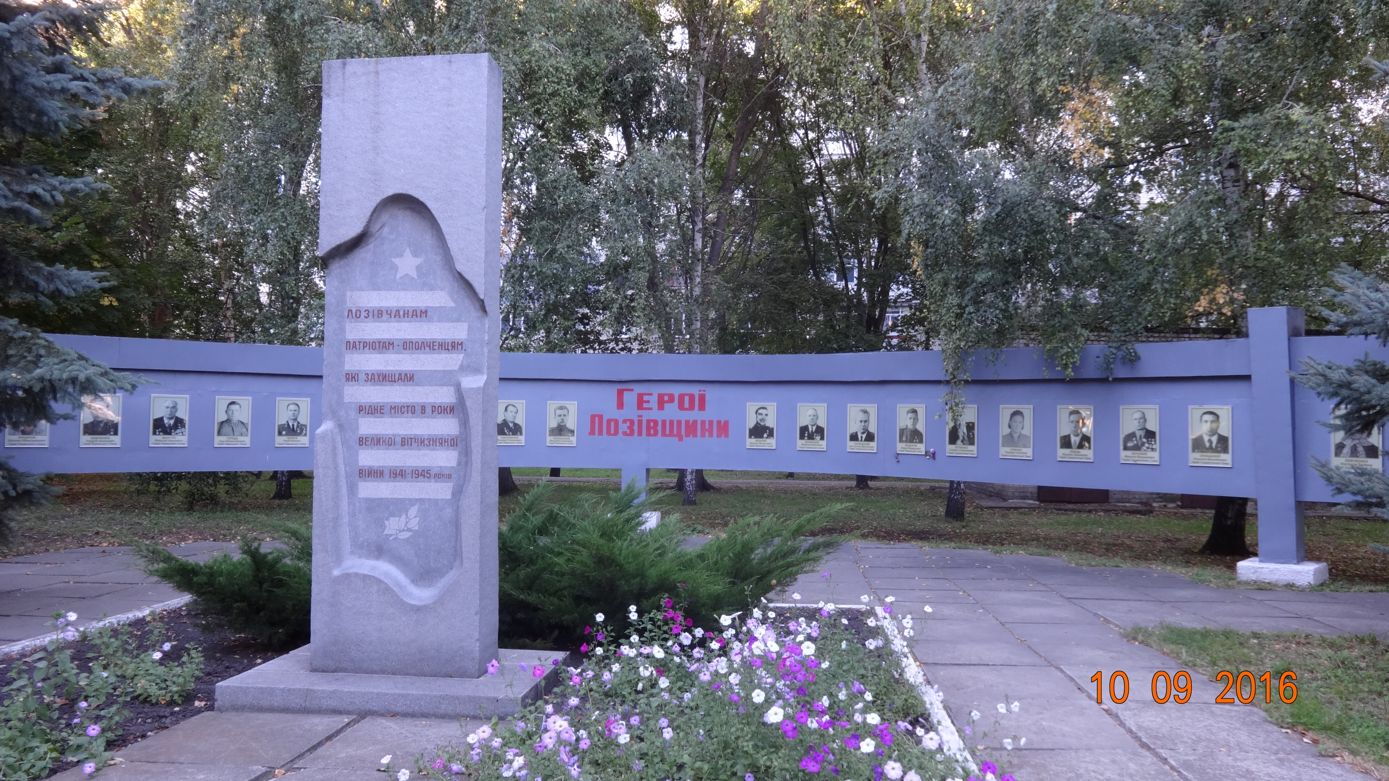 Пам’ятний знак воїнам-ополченцям, які загинули в роки Великої Вітчизняної війни, Лозова, бульв. Шевченка (вул. Жовтнева)